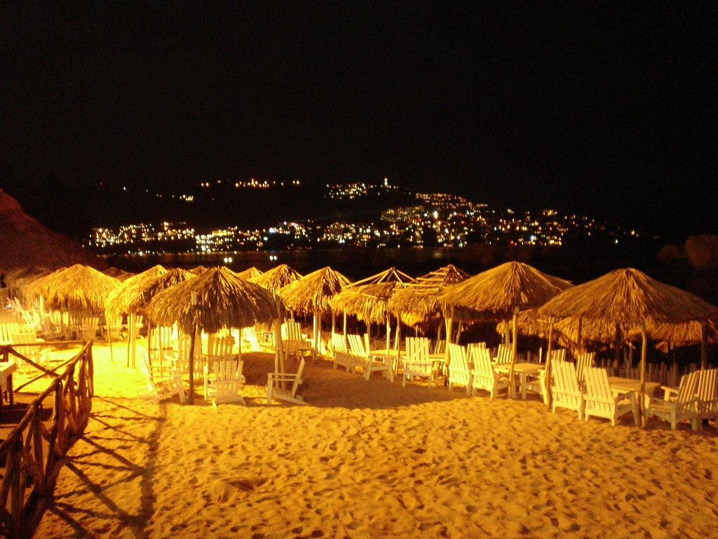 Panorama nocturno de la playa La Condesa en Acapulco, Guerrero, México .